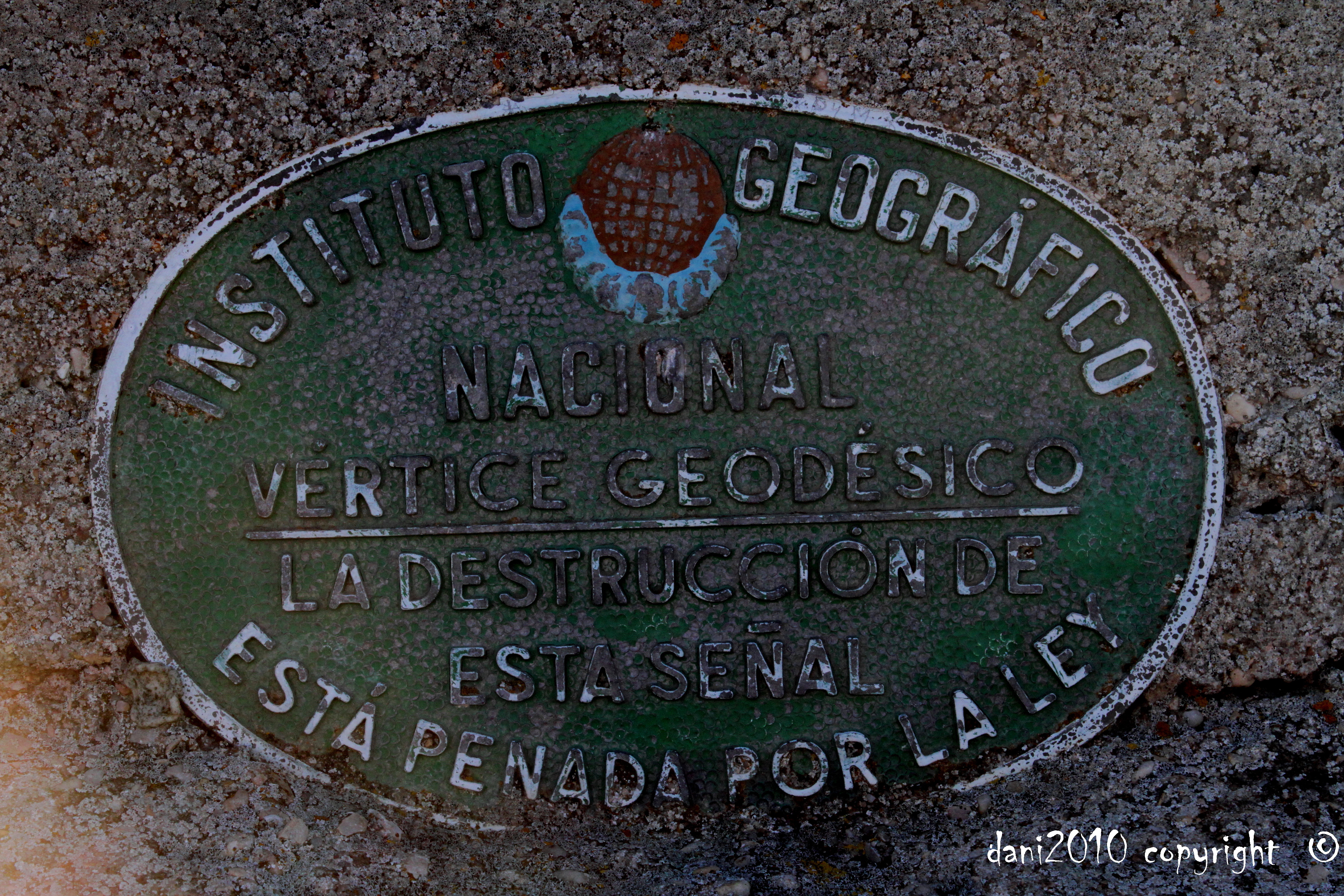 «Instituto Geográfico Nacional; Vértice Geodésico; la destrucción de esta señal está penada por la ley» - Coordenadas GPS: N39 16 20.75 W1 27 36.27